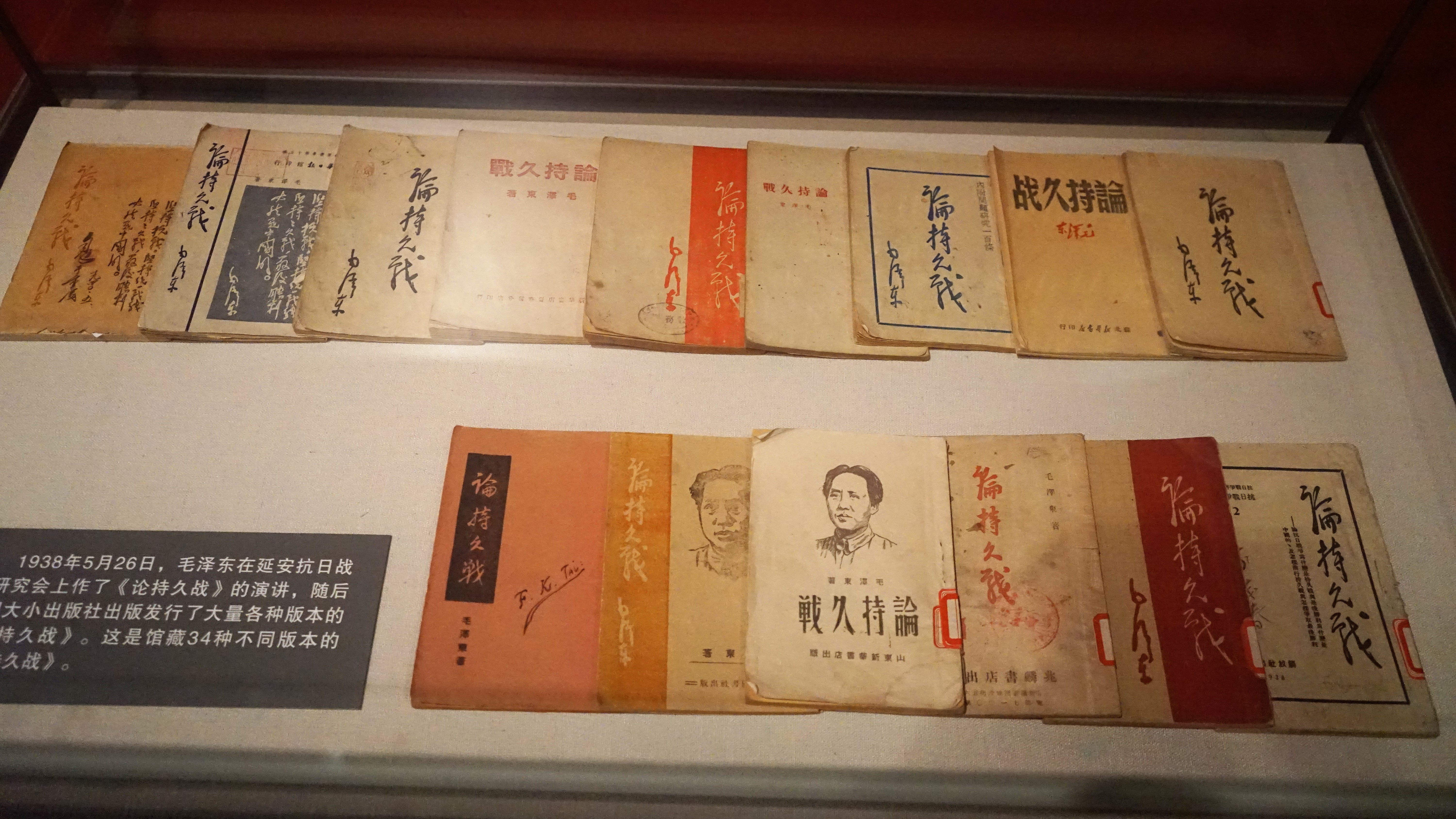 中文（中国大陆）: 34种版本论持久战